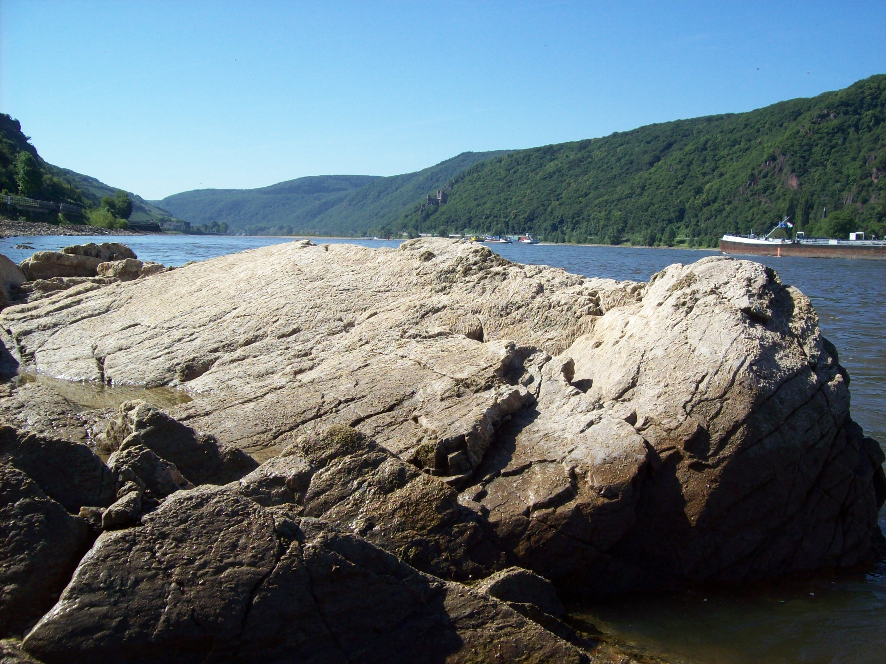 Teufelskaderleyen unterhalb des Teufelskadrich bei Lorch, Rheinkilometer 534,7. Pegel Kaub 93. Im Hintergrund Burg Rheinstein